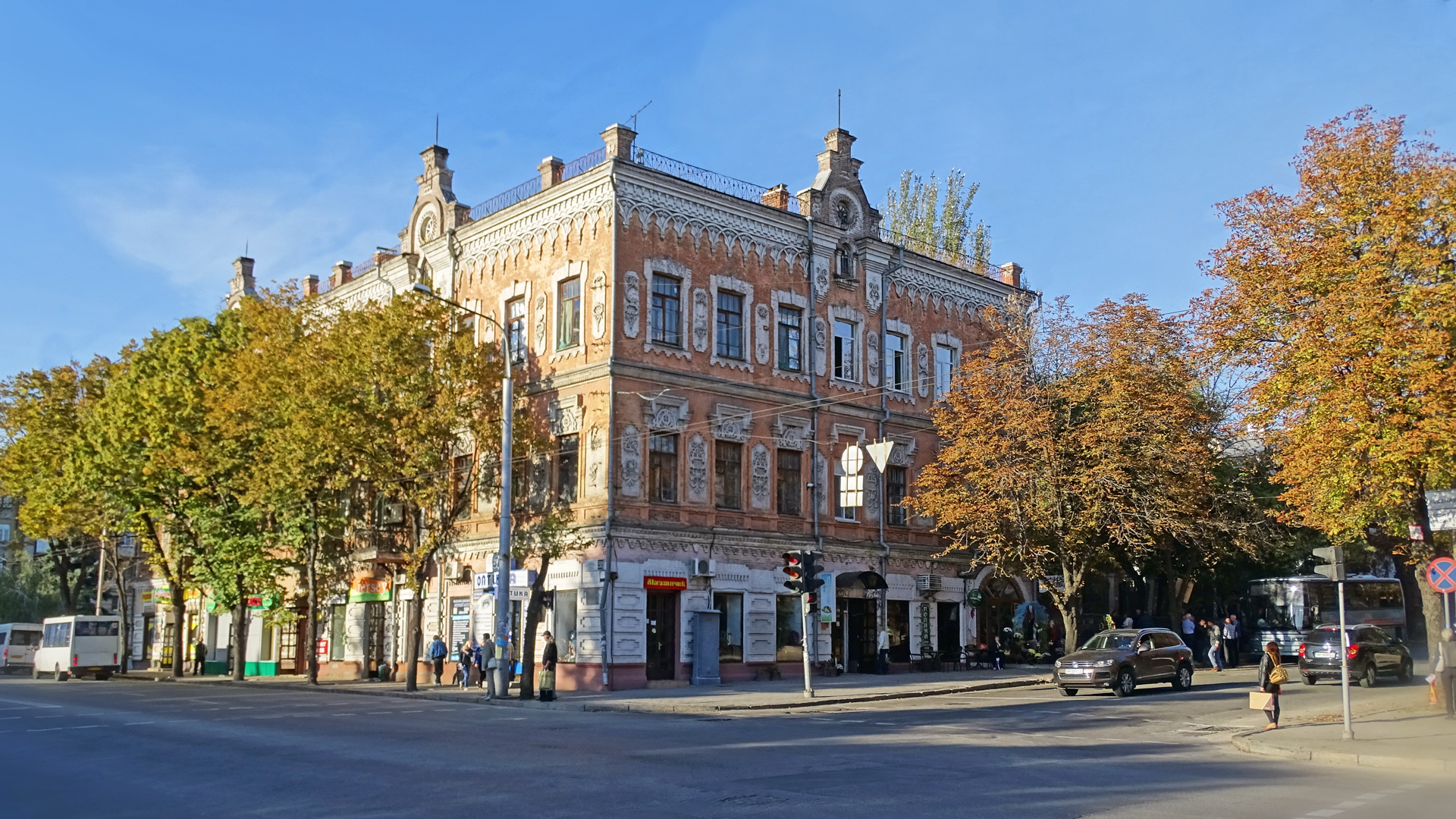 Прибутковий будинок Я.І. Лещинського, де містилася Перша Олександрівська Рада робітничих, солдатських і селянських депутатів, Запоріжжя, просп. Леніна, 52/25